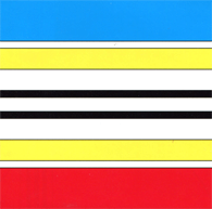 Прапор міста П'ятихаток